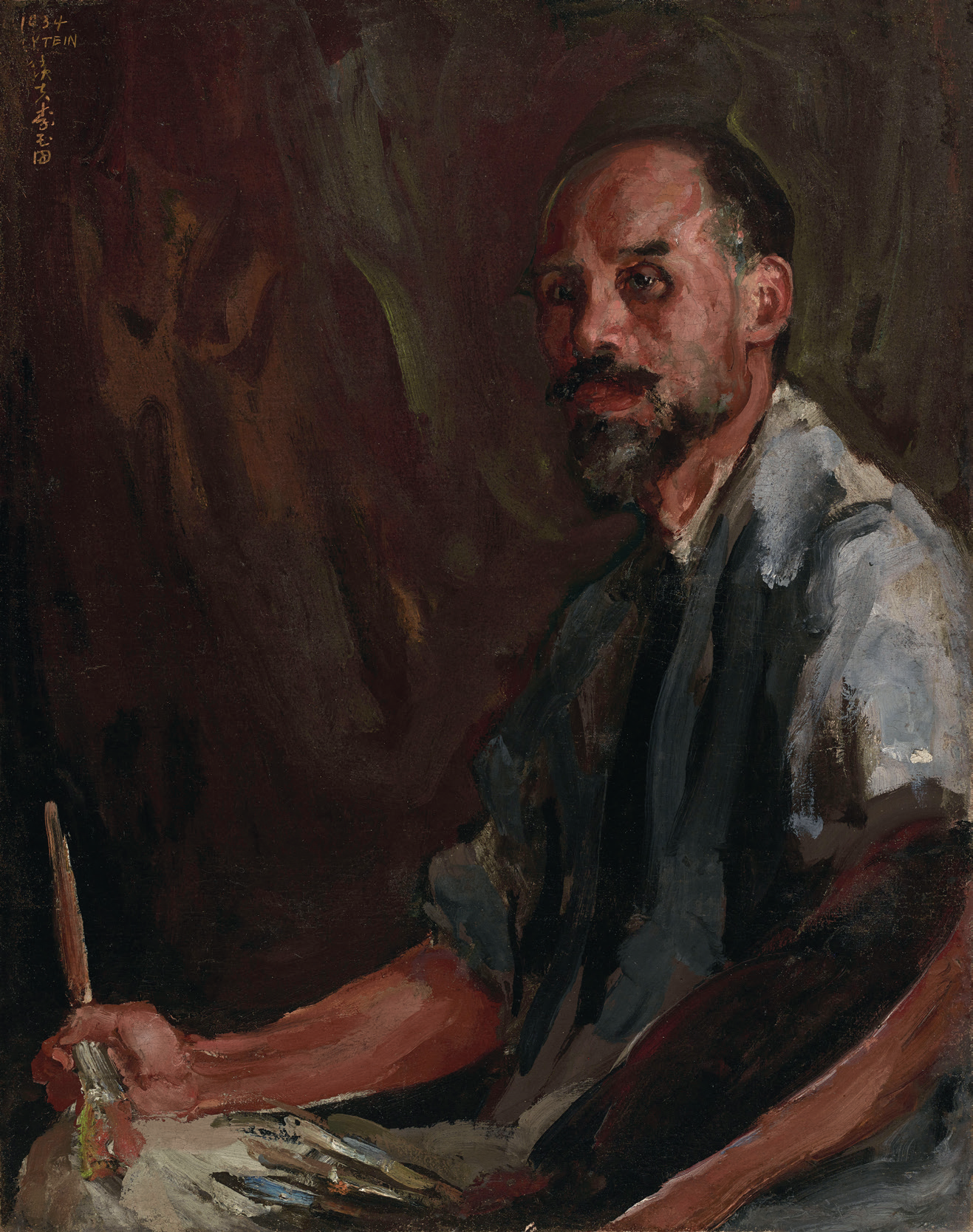 李鐵夫的《馮剛百》